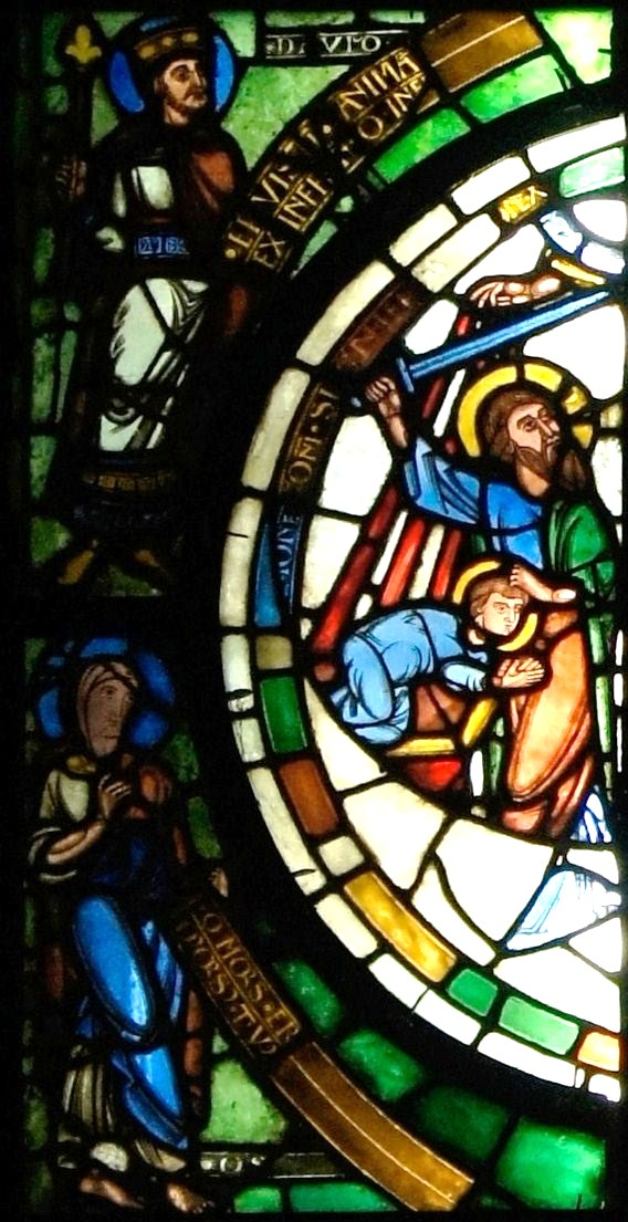 le sacrifice d'Abraham, dans le vitrail de la rédemption en la Cathédrale Saint-Étienne de Châlons.